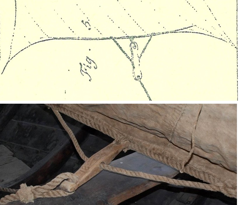 Kabbe, strammereiskap på på asymmetrisk råsegl